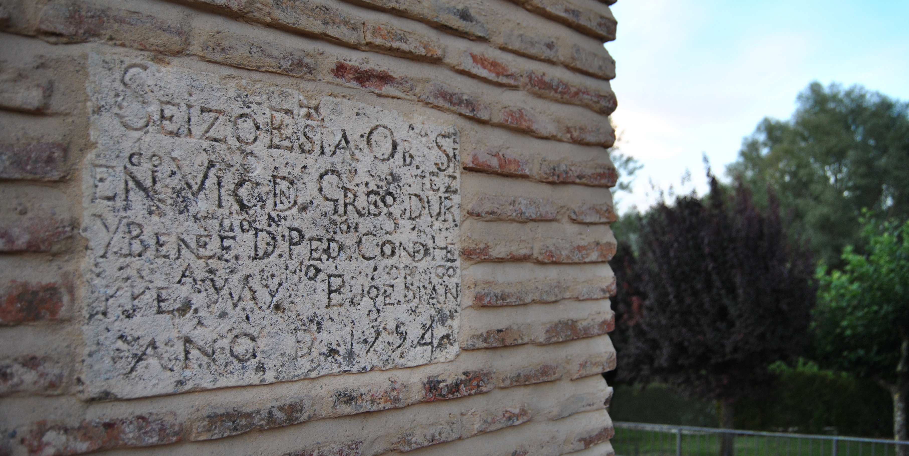 Placa situada en el exterior de la iglesia de Santiago, en calzada de los Molinos, dónde se explica parte de su historia.